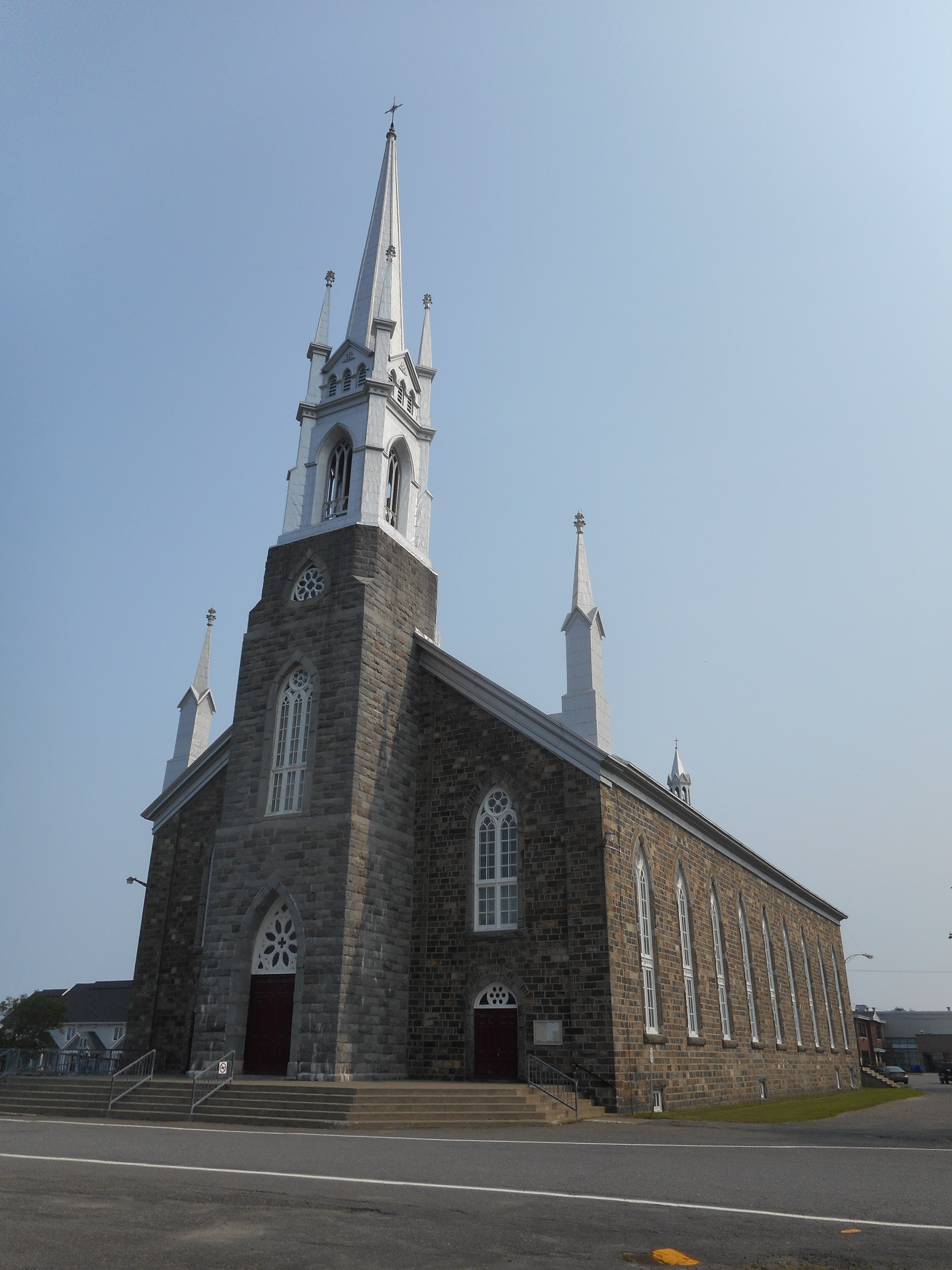 L'église de de La-Décollation-de-Saint-Jean-Baptiste de L'Isle-Verte a été construite en 1846 et 1855. Elle fait partie de l'îlot religieux de L'Isle-Verte, qui a été constitué site du patrimoine en 2008.